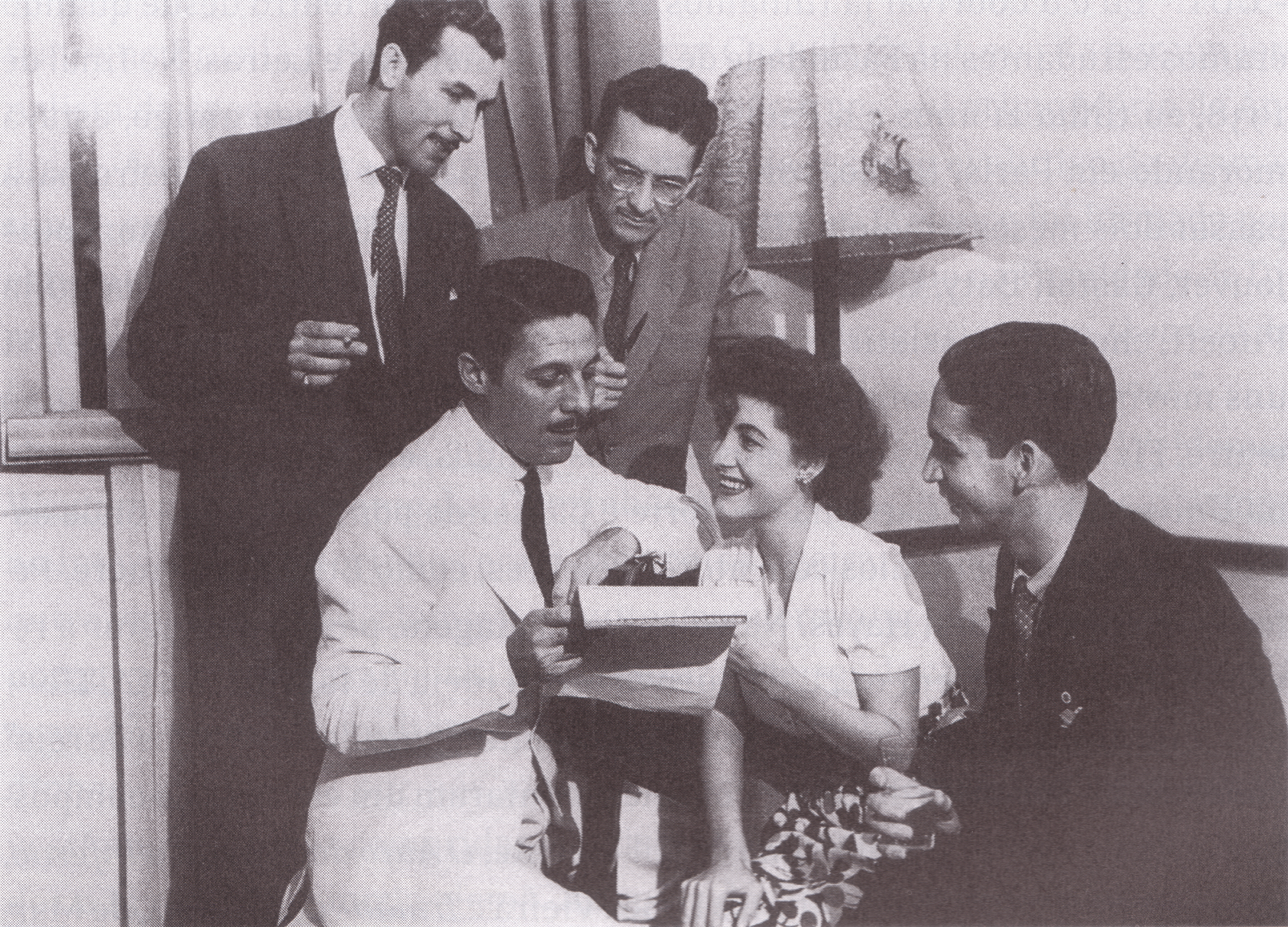 Atrás: Tito Lívio Fleury Martins e Plínio Freire de Sá Campello. À frente: Jean Sablon, Cacilda Becker e Genperfil (repórter). Hotel Esplanada, março de 1943.